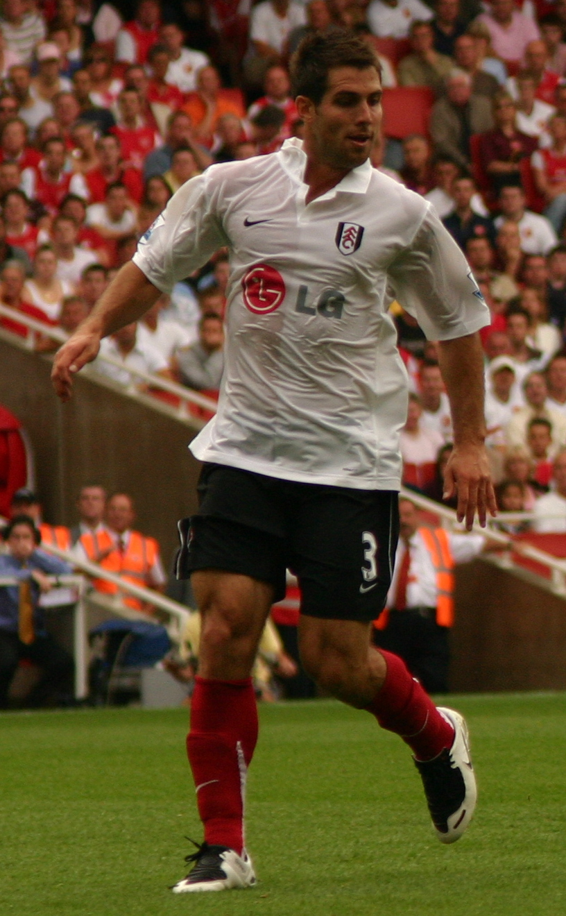 Arsenal vs Fulham, August 2007.